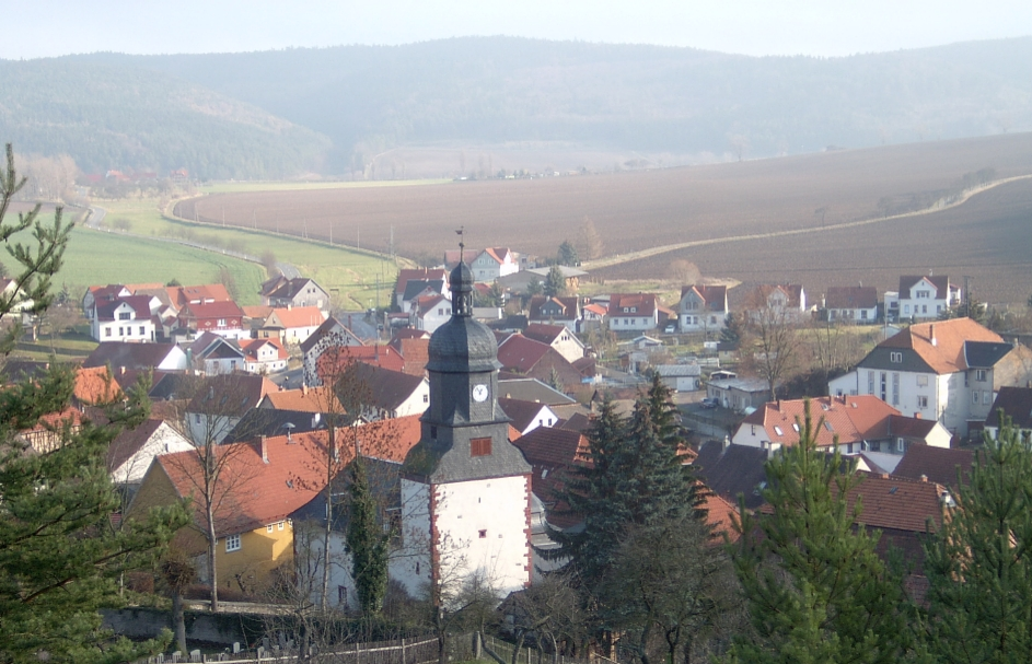 Angelroda aus Richtung Nordosten. Aufnahme von der Rippersrodaer Straße oberhalb des Eisenbahnschachtes.